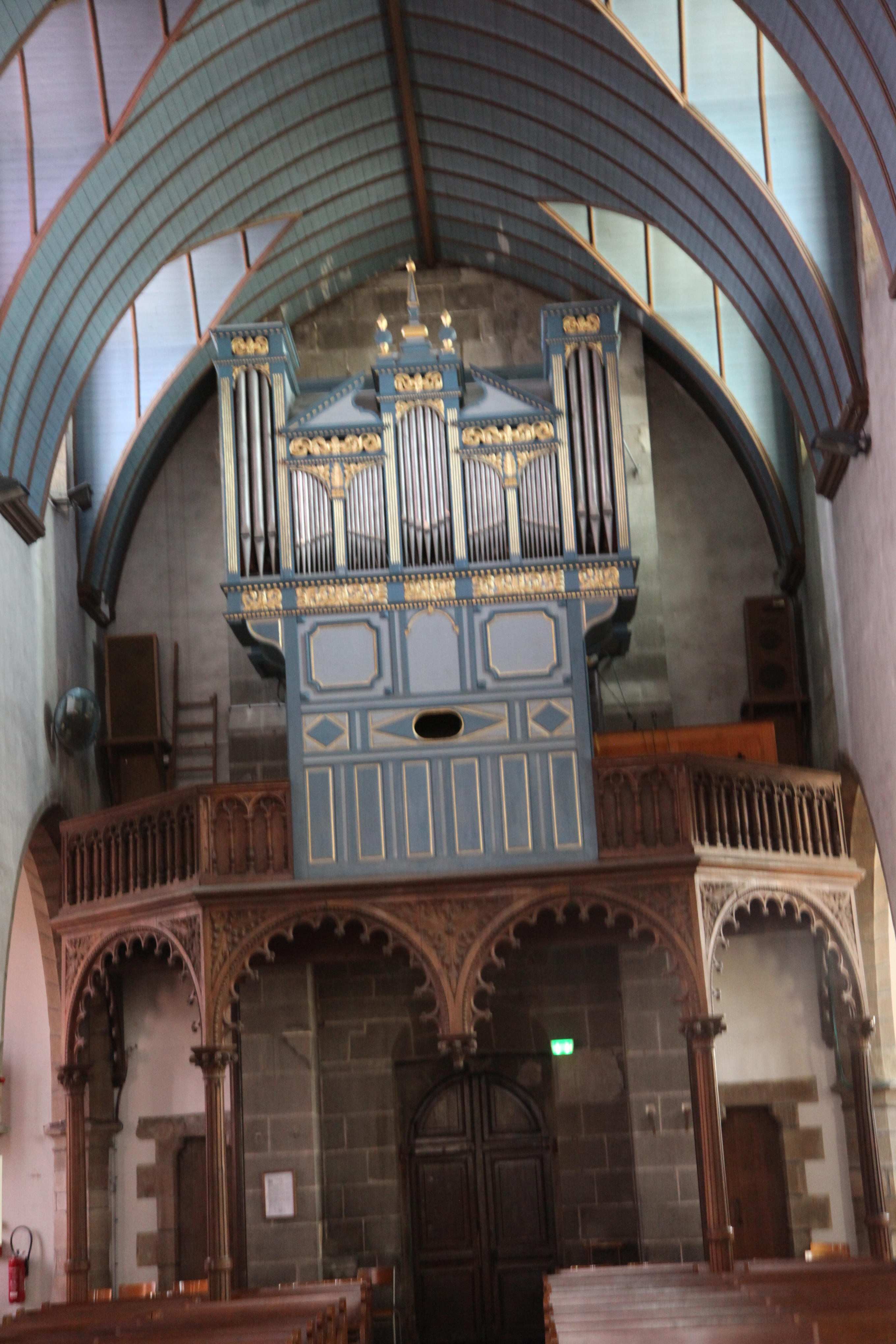 Crozon (Finistère, France), église Saint-Pierre, buffet d'orgue de 1690 pour l'instrument de Robert Dallam, reconstruit par Alain Sals en 1992.